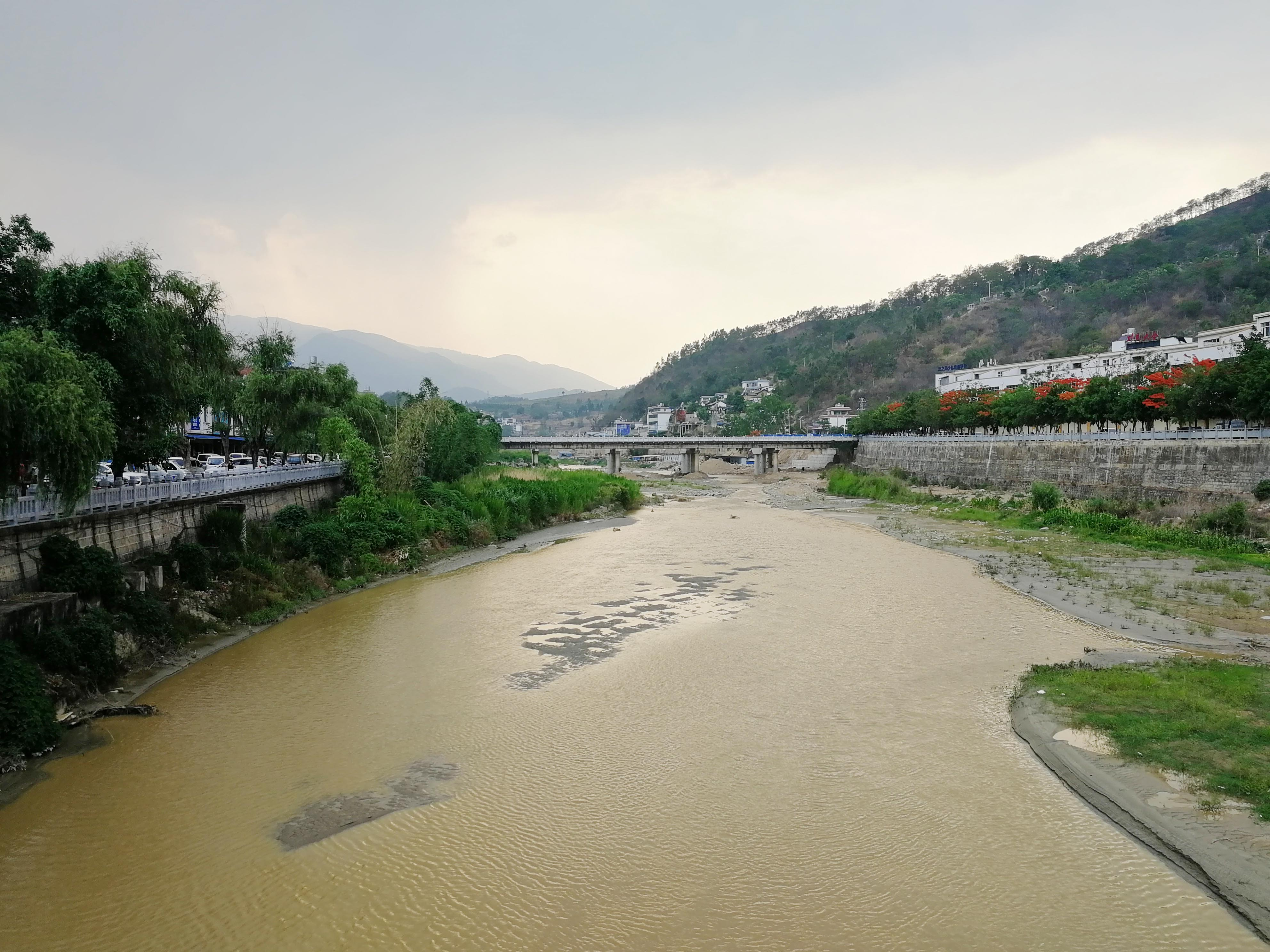 中国临沧市云县县城境内的凤庆河。